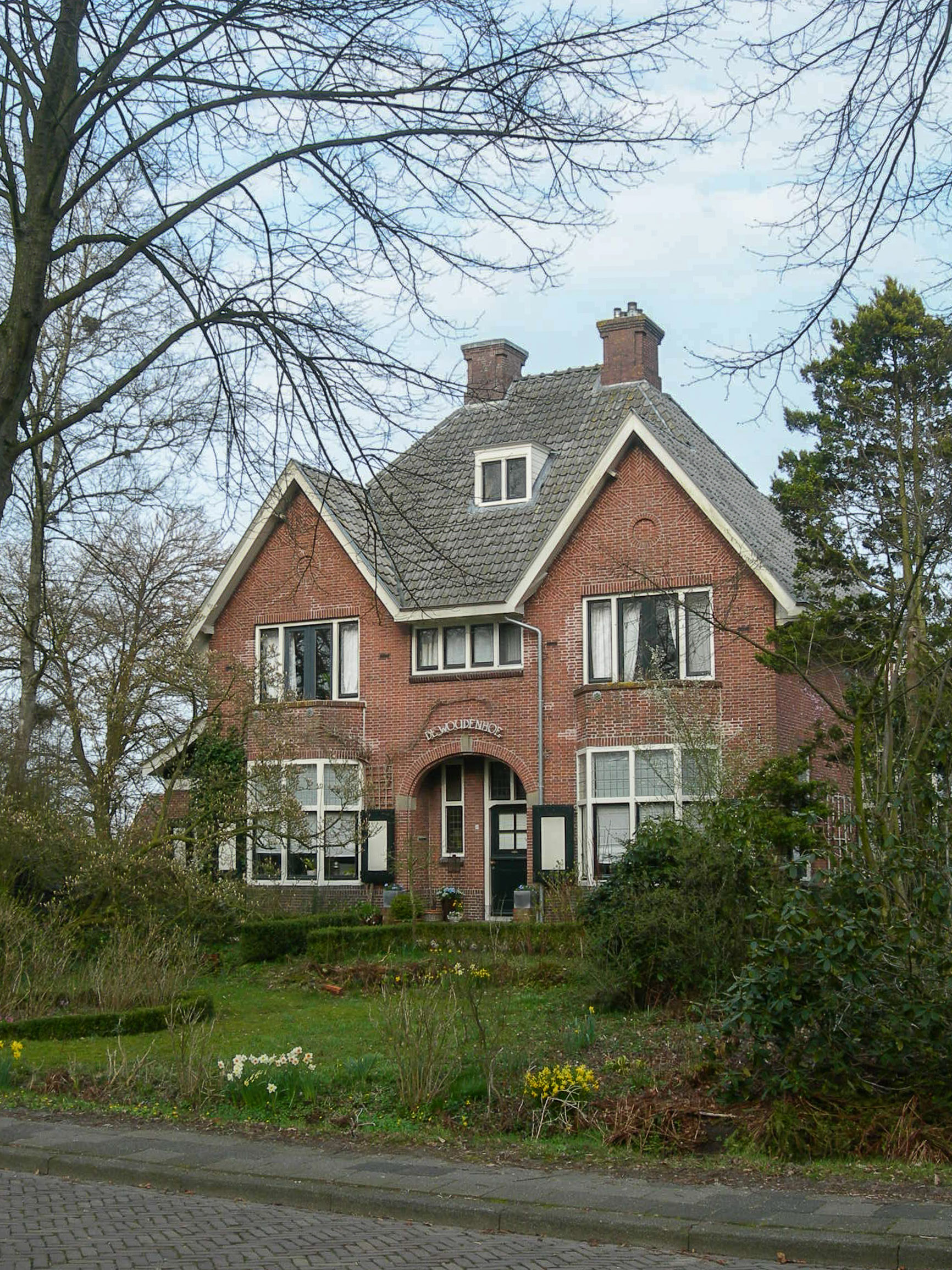 Villa Woudenhof